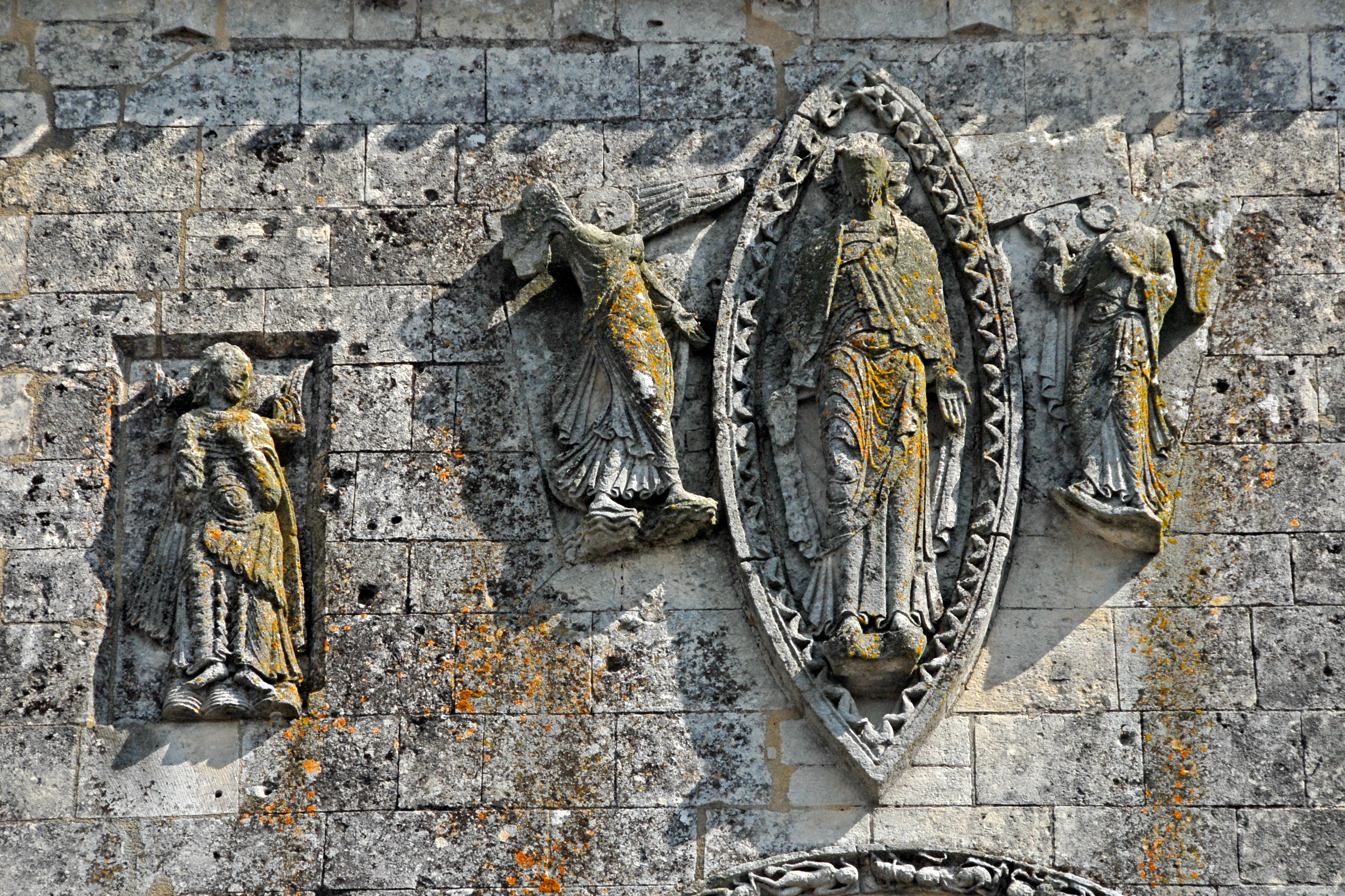 Pfarrkirche Saint-Pierre-de-Pérignac, Relief, Himmelfahrszene